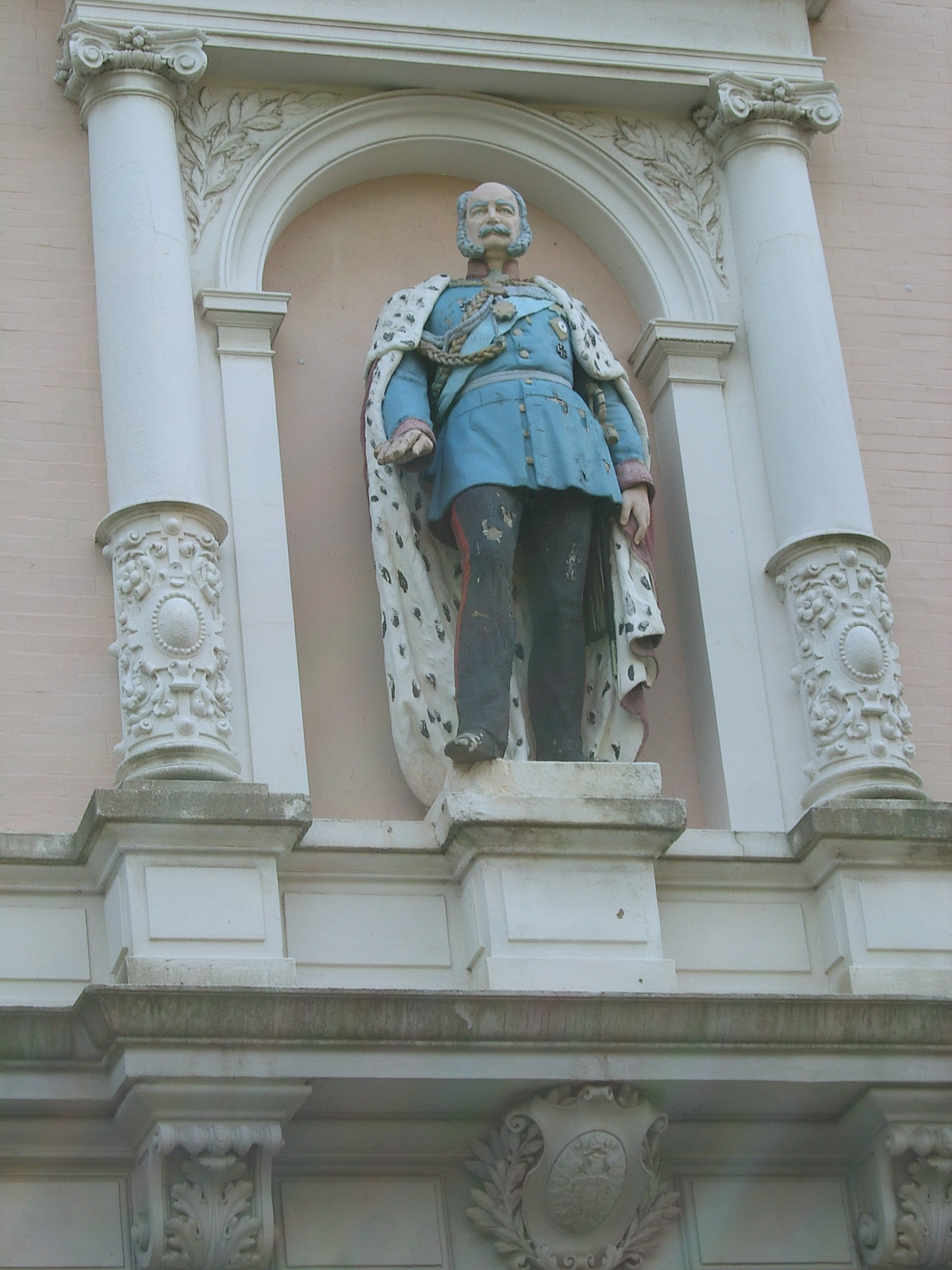 Hamburg, Altona-Altstadt, Bei der Friedenseiche